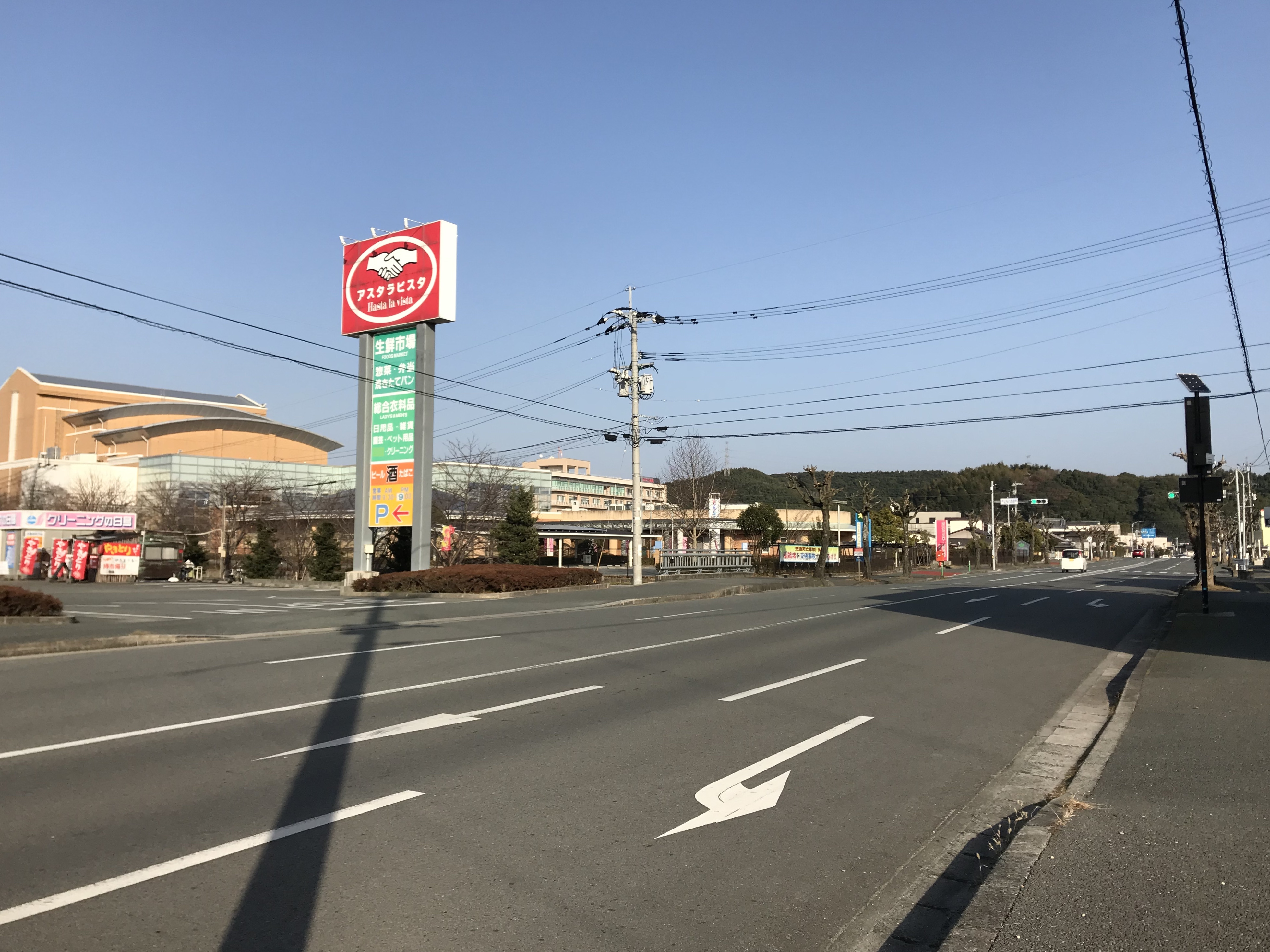 みやま市文化施設「まいピア高田」前の福岡県道780号